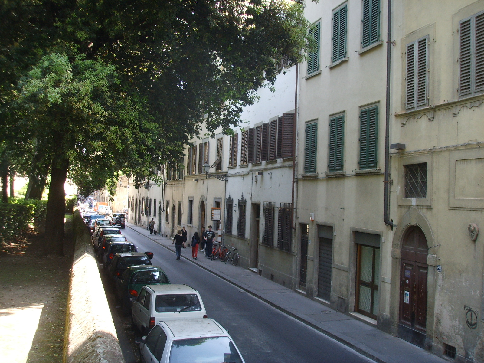 Via romana (dal giardino corsi annalena)